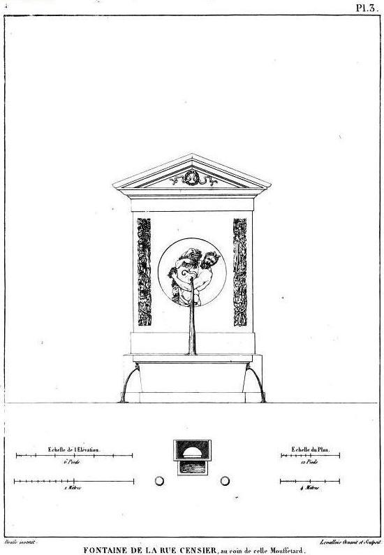 "Fontaine de la rue Censier, au coin de celle Mouffetard"